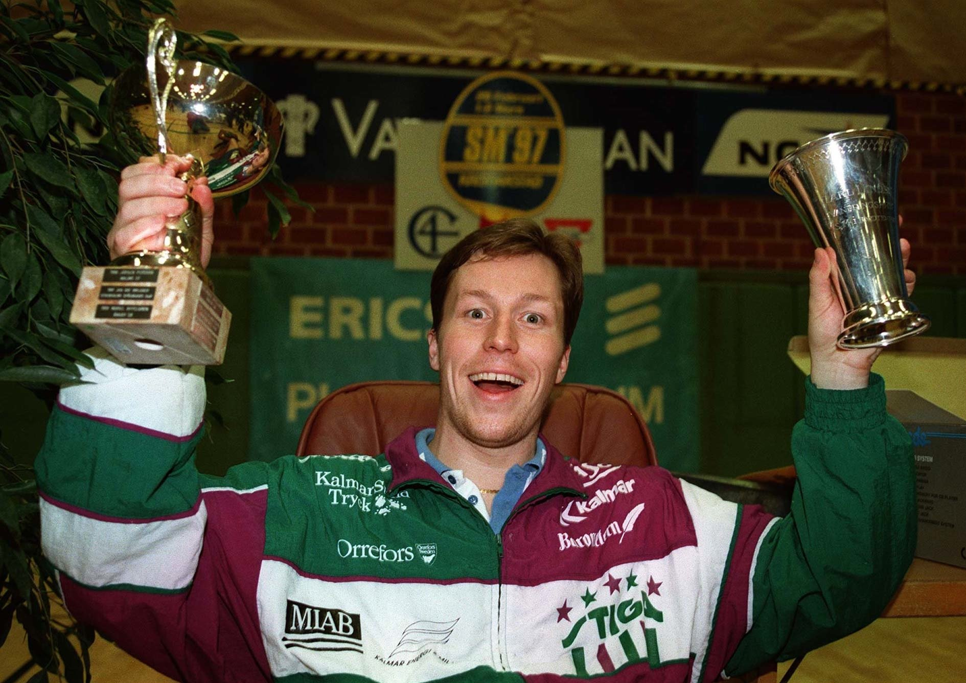 J-O Waldner Svensk mästare 1997 SM 97